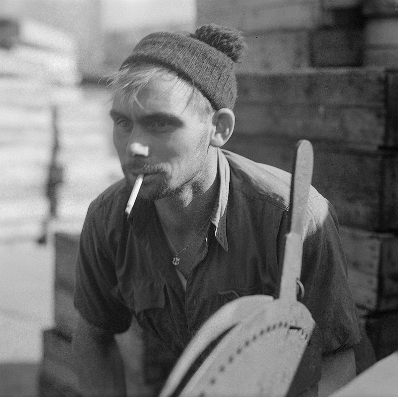 Original image description from the Deutsche Fotothek Stralsund. Fischereihafen, Fischer